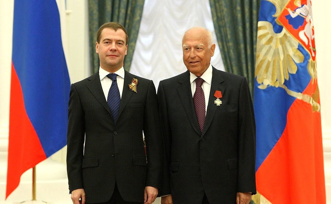 Виктор Черномырдин